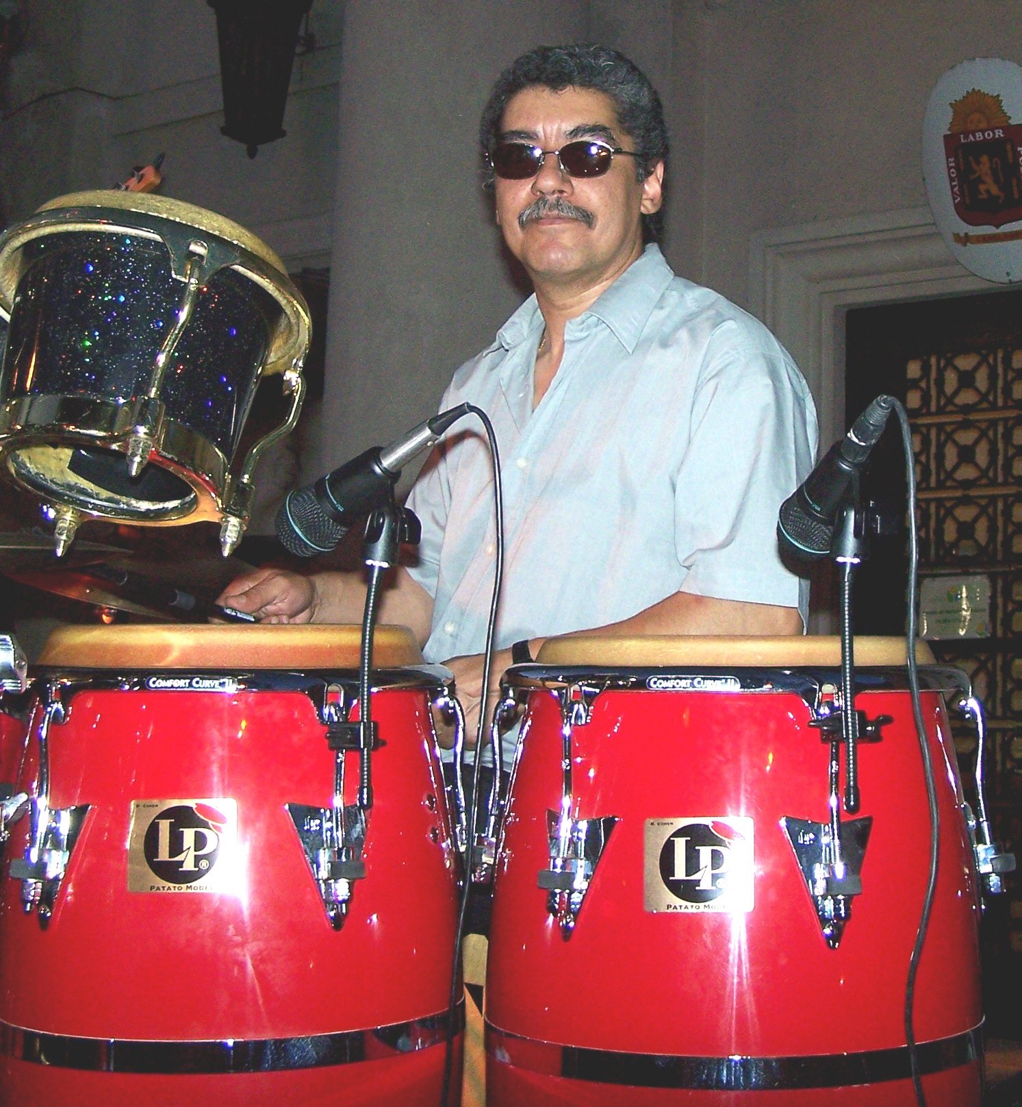 Jorge Trasante (1953-), percusionista y compositor uruguayo, que integró varios grupos de renombre internacional, y que cuenta en su haber con más de 30 años de trayectoria artística.